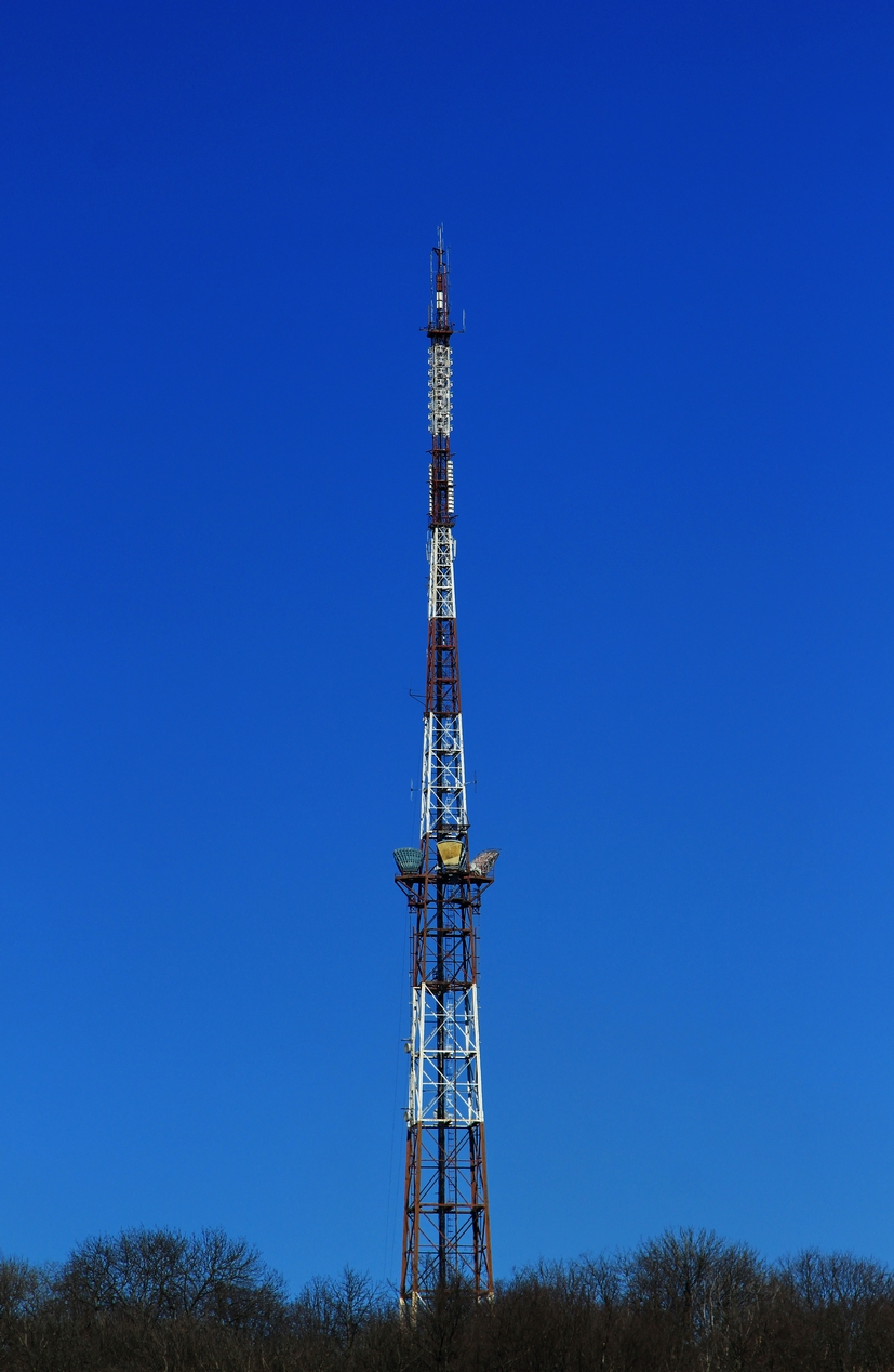 Телевізійна вежа м.Кіровограда